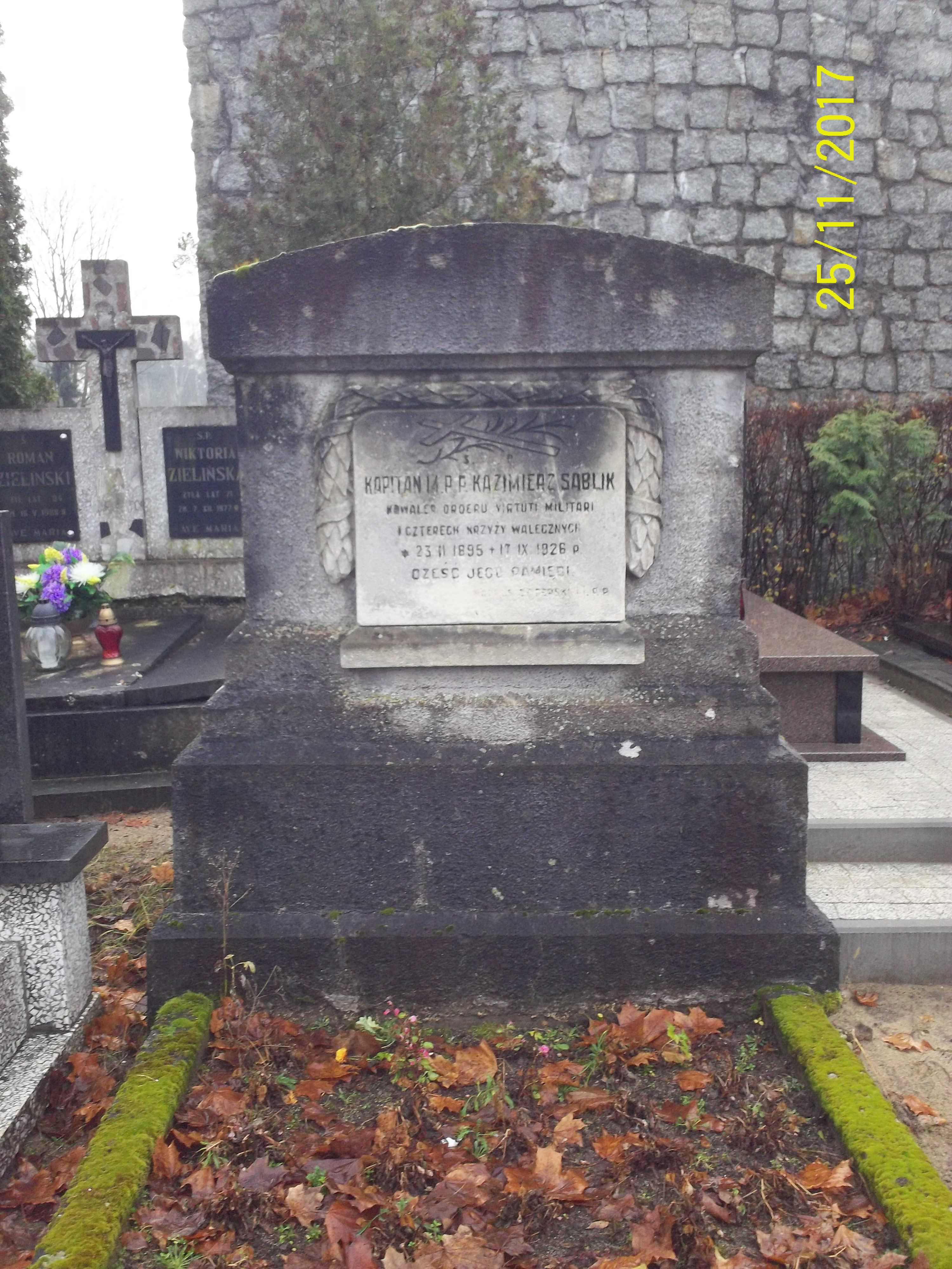 Grób 1